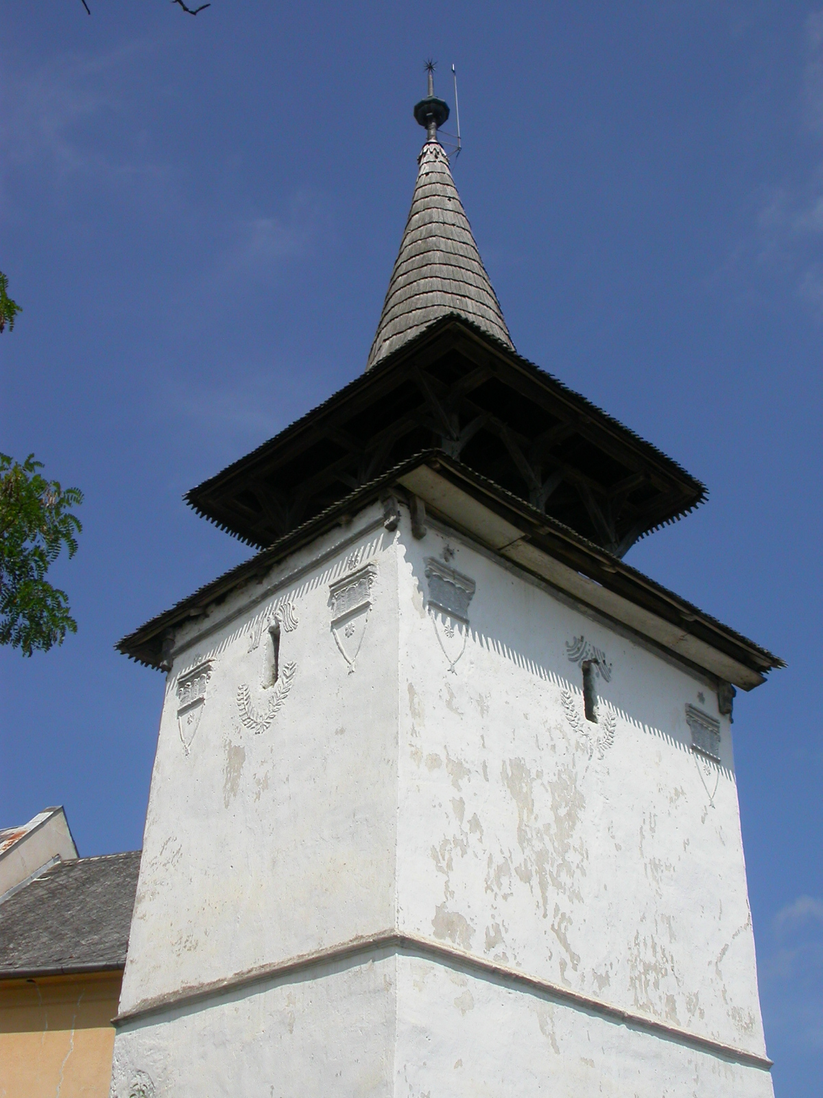 Ansamblul bisericii reformate, sec. XVI - XIX